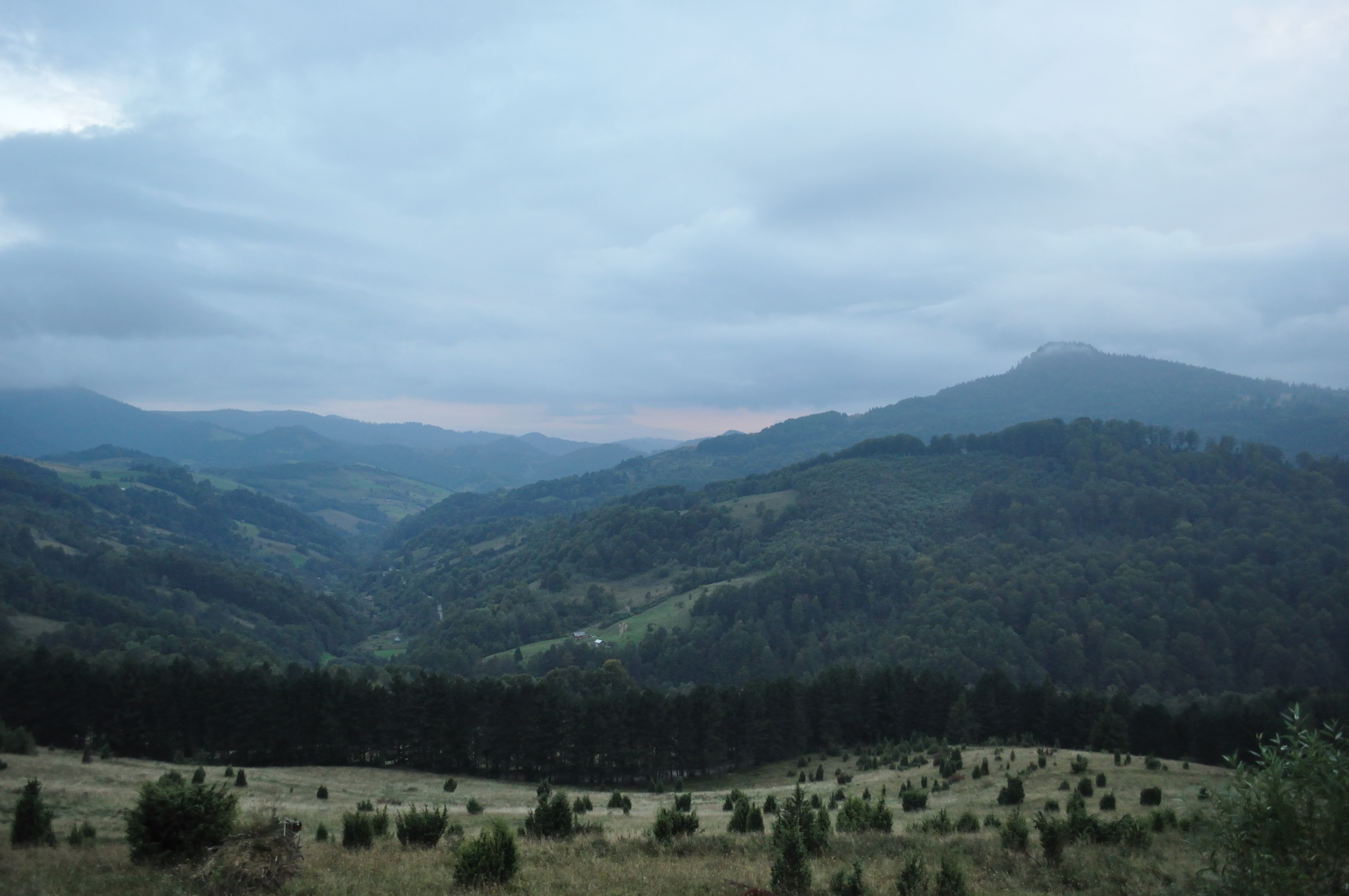 Bucium, județul Alba